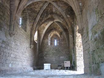 Entrance gate into the crusaders fortress of Caesarea, Israel (11.-12. cent.); Ulazna vrata u križarsku utvrdu u Cezareji Primorskoj (Izrael, 11.-12. st.).